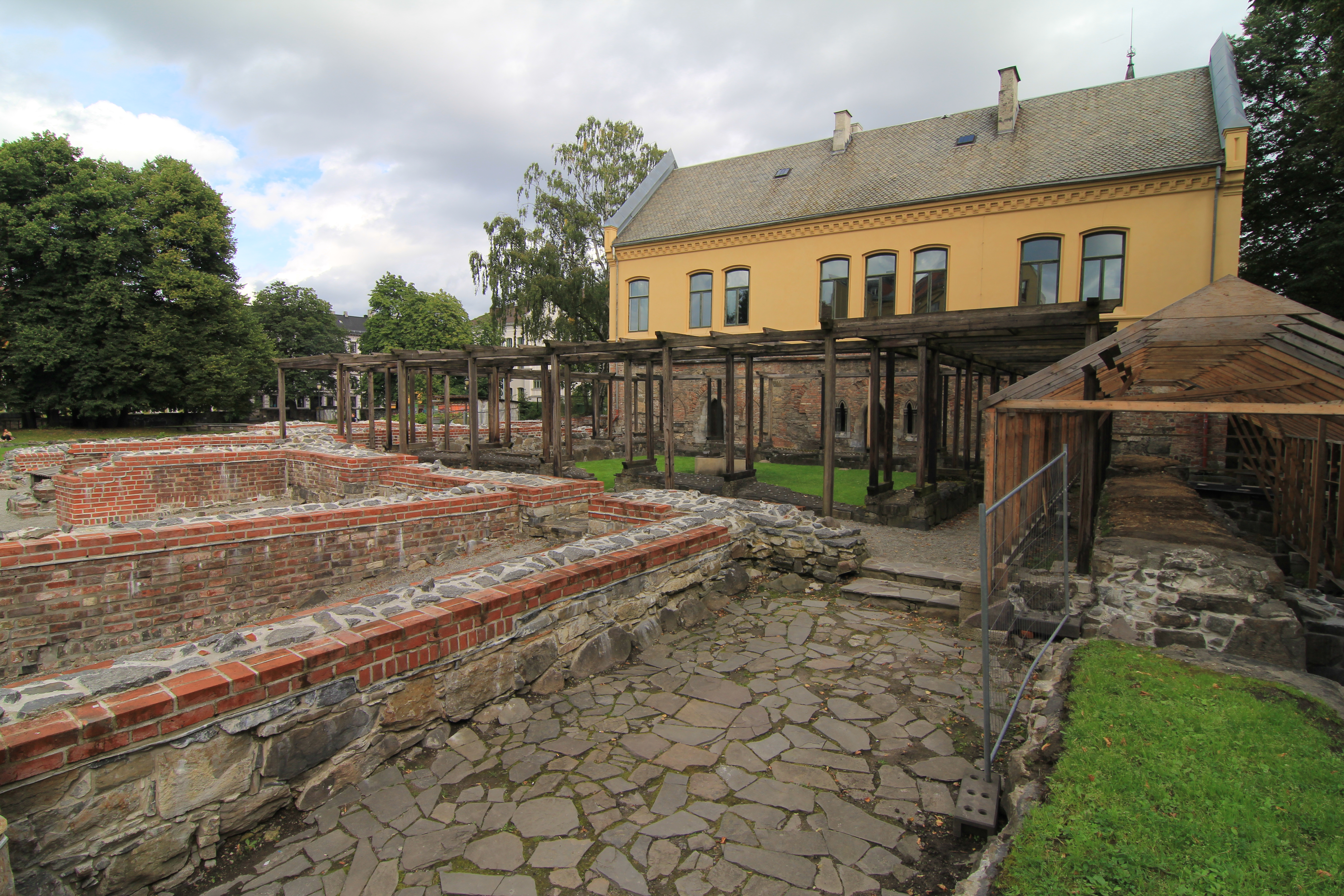 Olavsklosteret i Oslo ble grunnlagt i 1239. Ruinene av Olavsklosteret ble fullrestaurert i 2011, og inngår som del av Ruinparken i Gamlebyen.